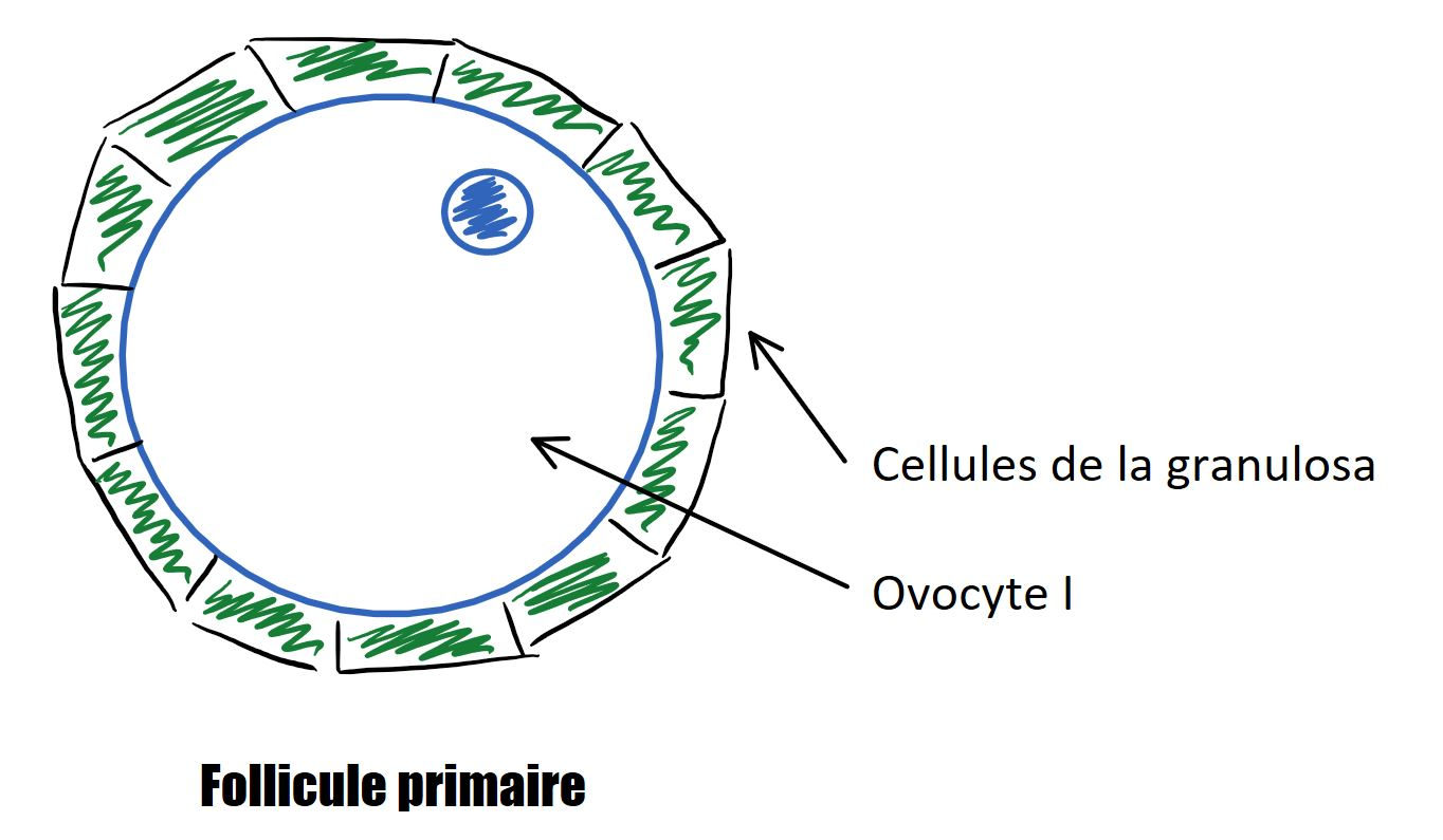 Follicule primaire avec ovocyte, cellules de la granulosa. Par J. GOY-MARTIN